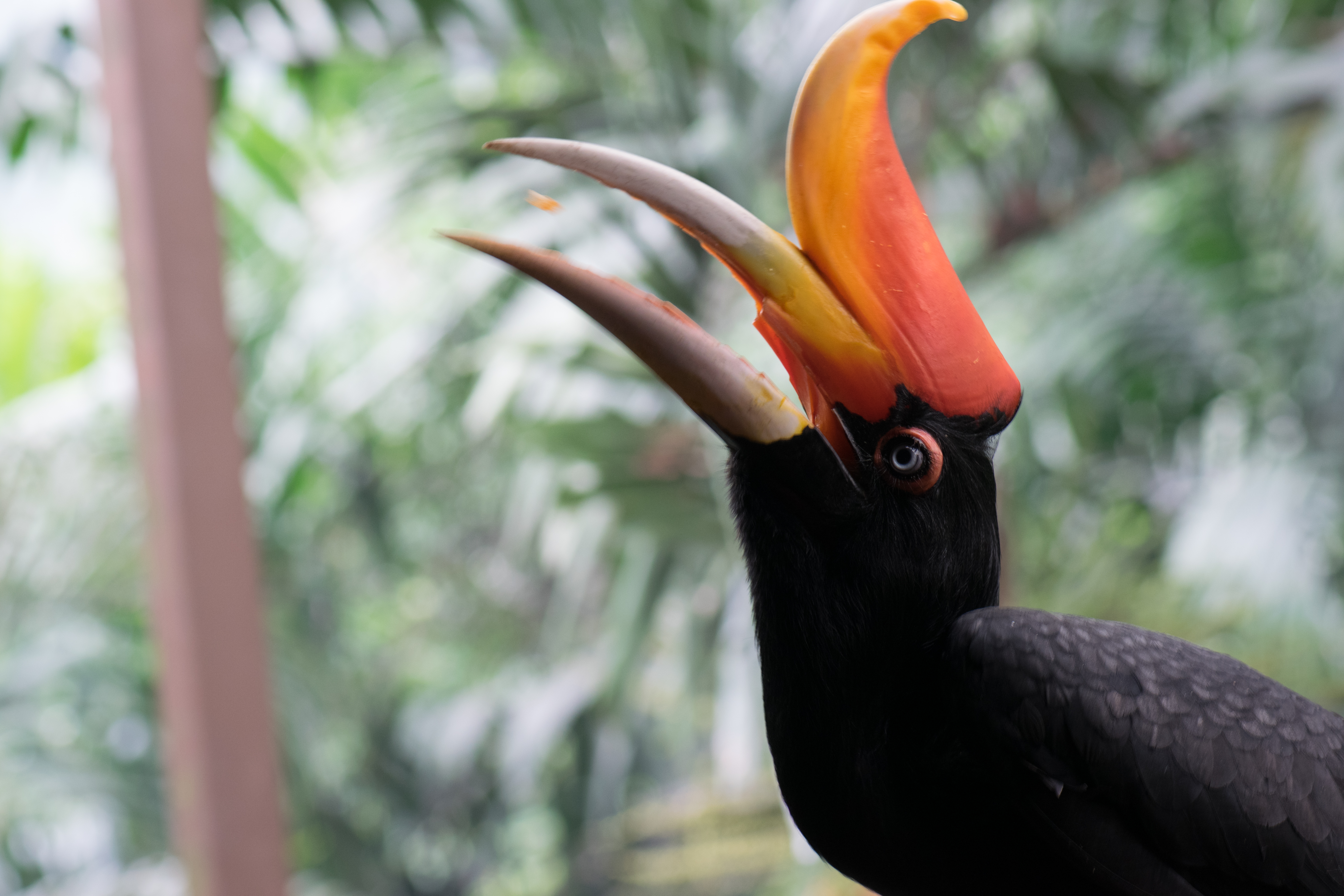 Kuala Lumpur 2015